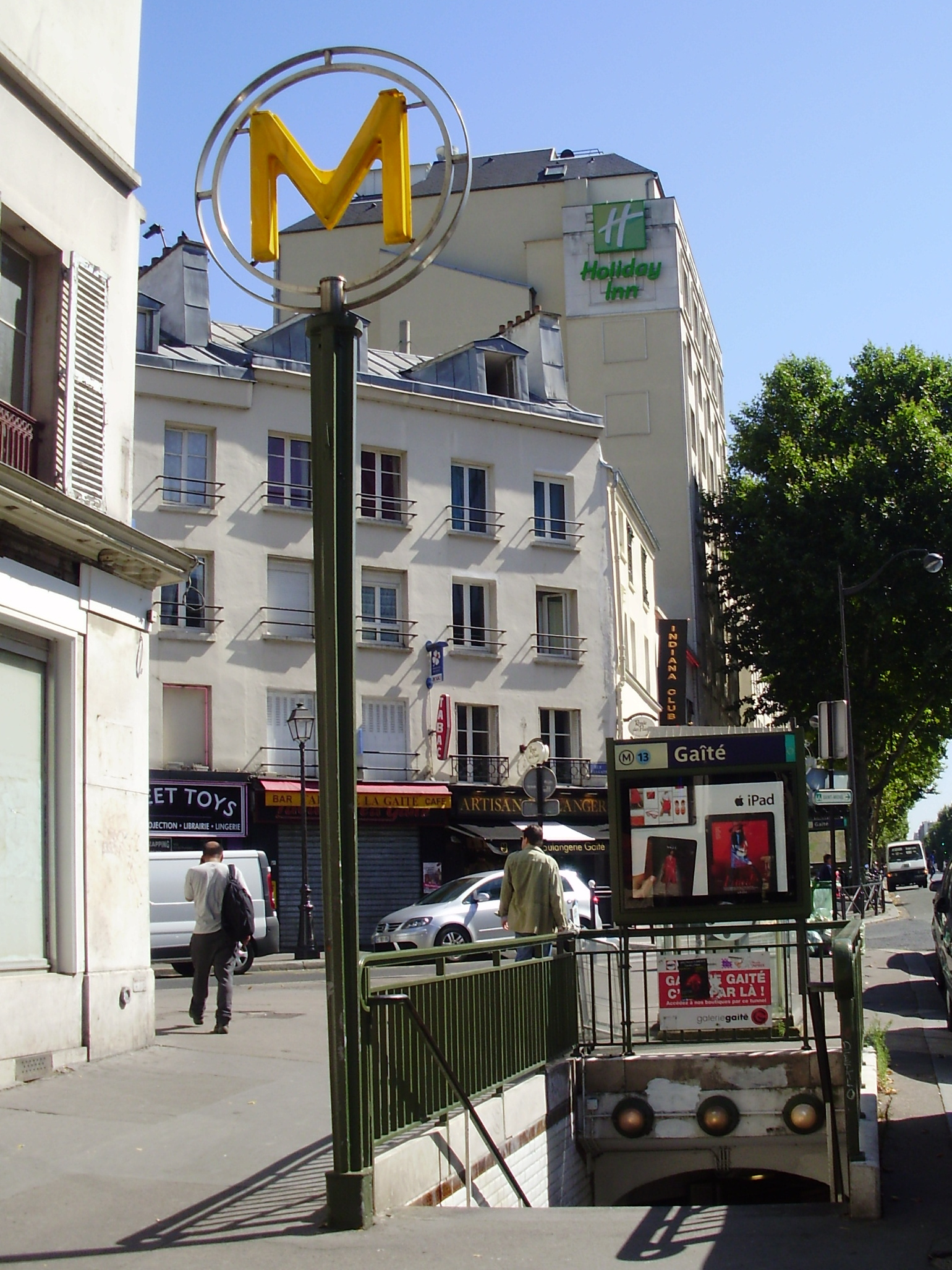 Station Gaîté du métro de Paris : entrée de la station au croisement de l'avenue du Maine et de la rue de la Gaîté, à Paris 14e, France.